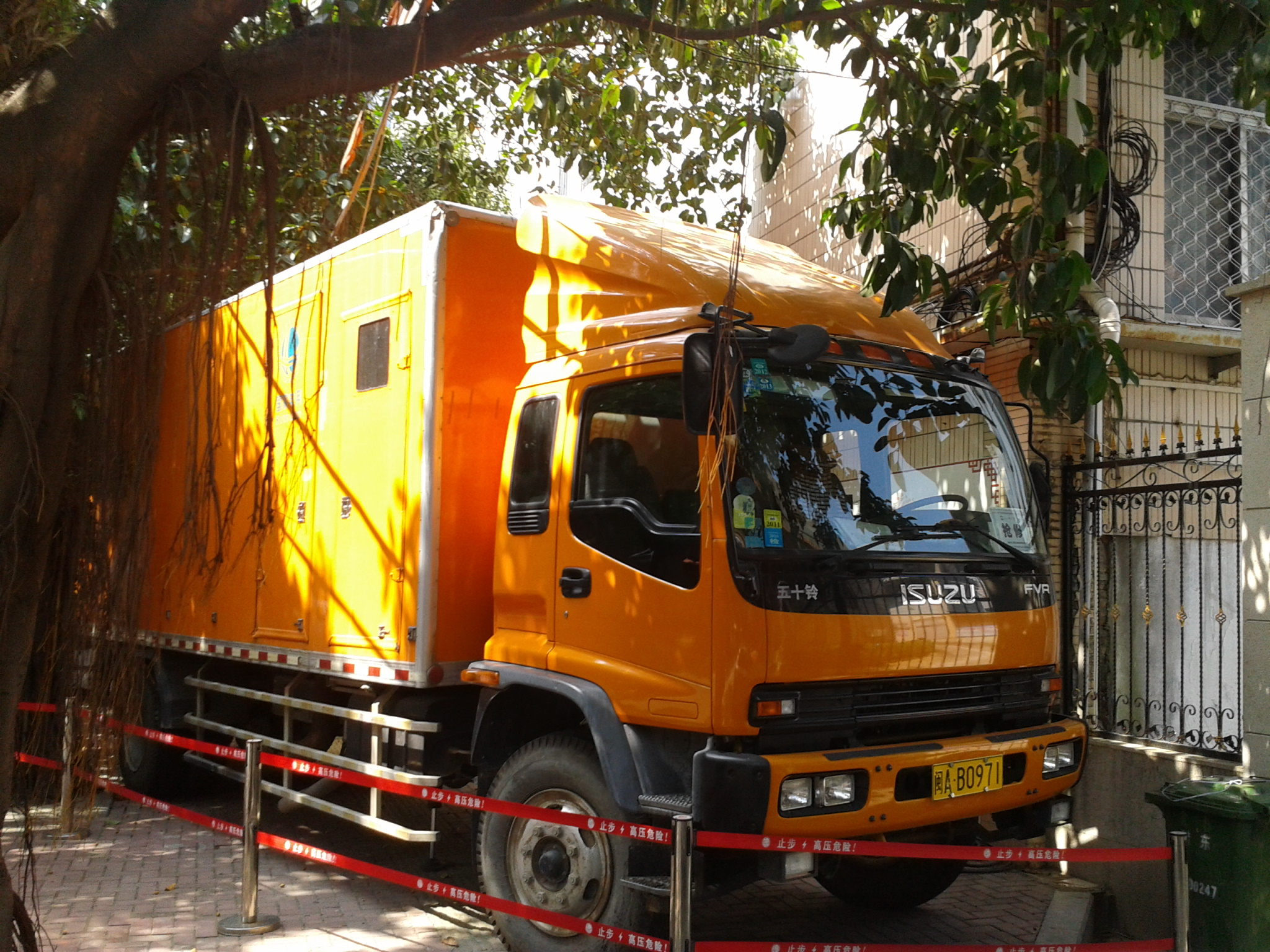 2014年福州中考屏东中学考点旁，一辆国家电网供电车。在考点突然停电时，供电车可以紧急供电确保考试——如英语听力测试——顺利进行。